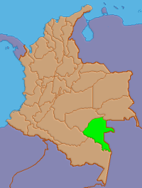 Mapa de localización de Vaupés, Colombia